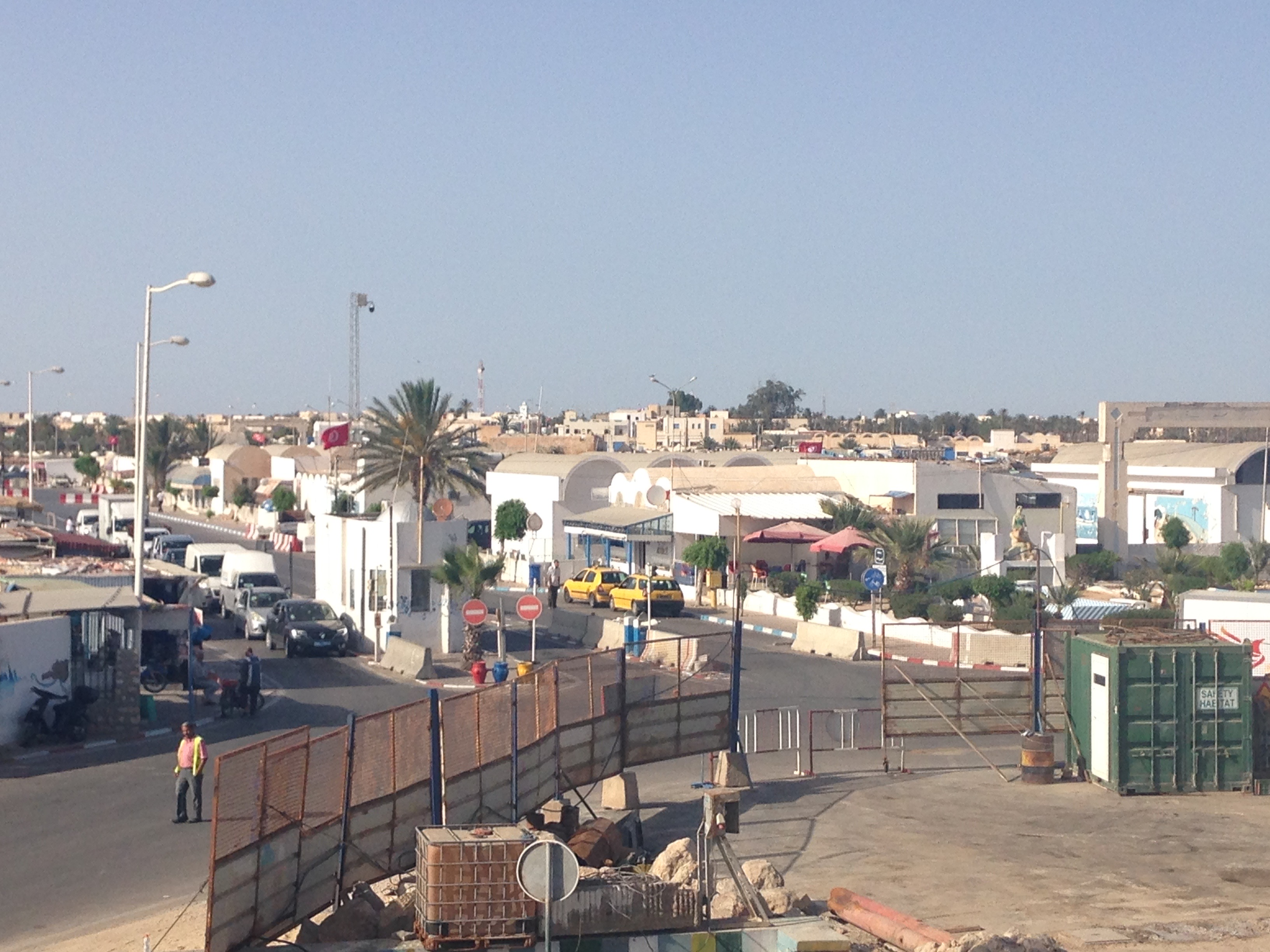 Vue du port d'Ajim (Tunisie)